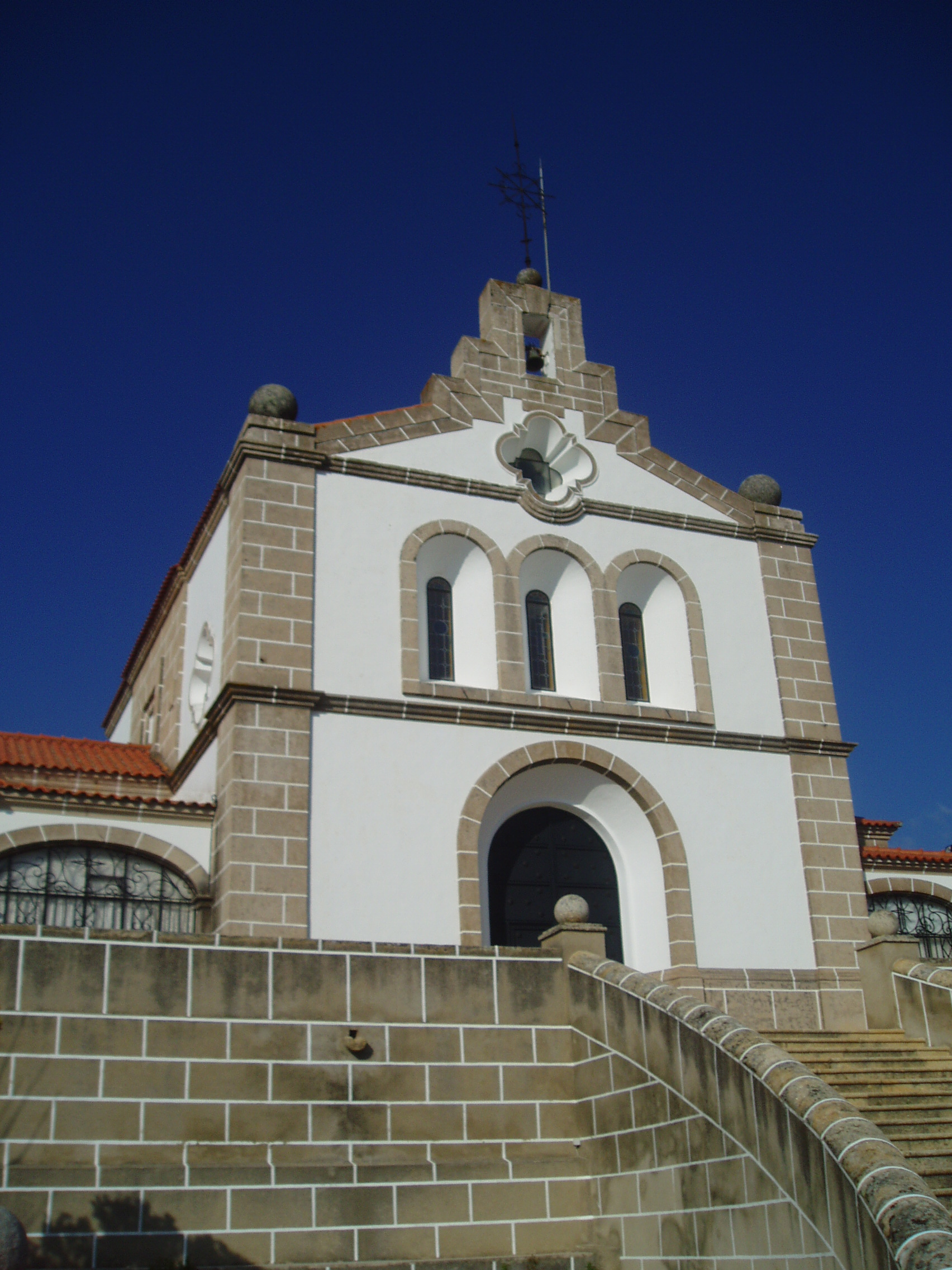 Fachada de la ermita.